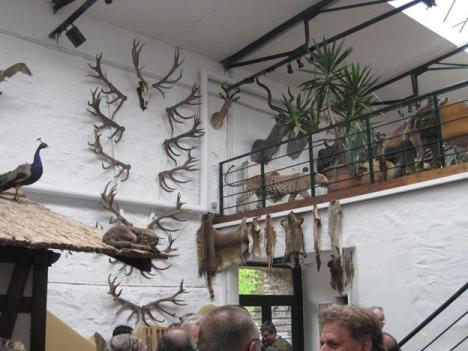 Das Erlebnismuseum Lernort Natur in Monschau Foto:djv